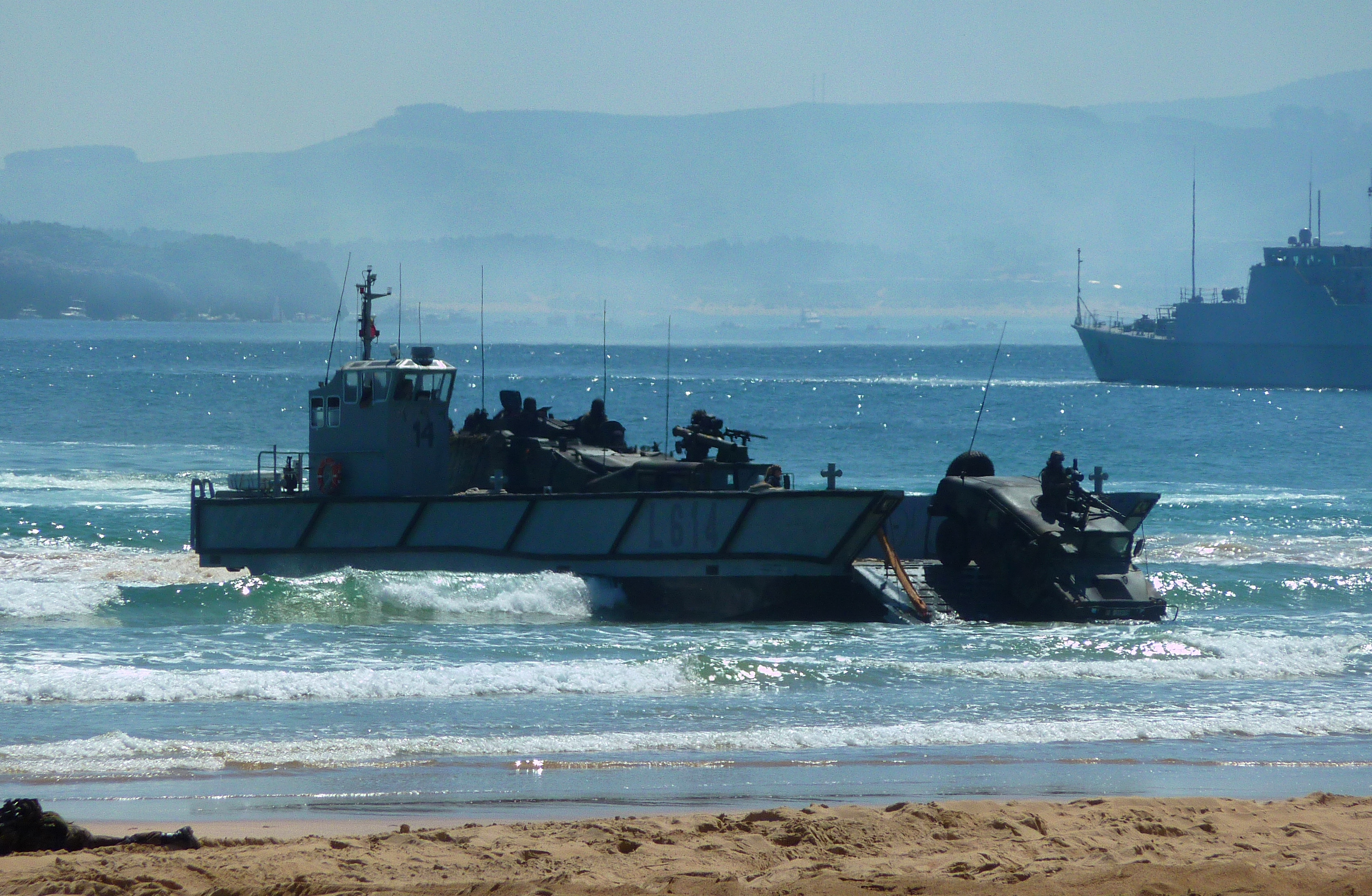 Lancha de desembarco clase LCM-1E L-614 de la Armada Española.